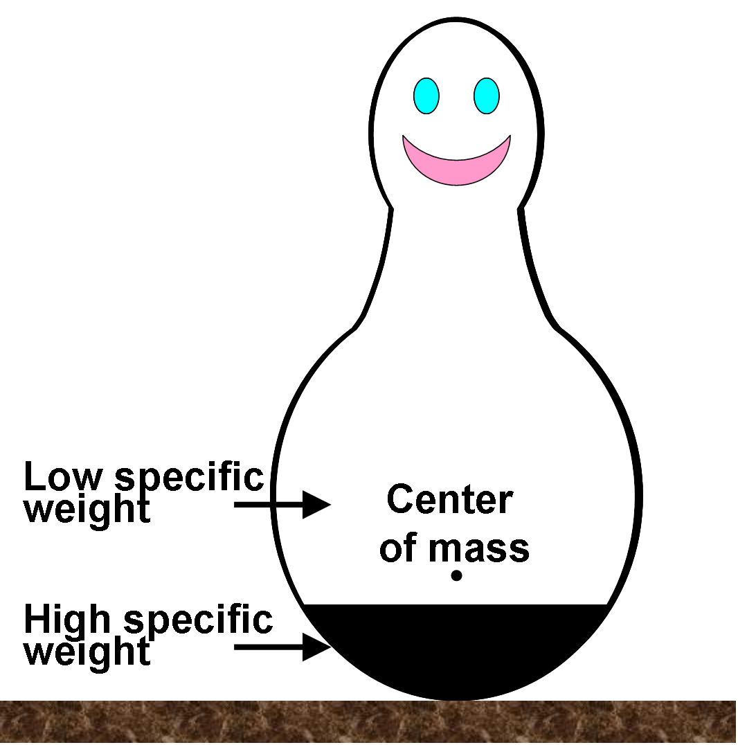 Inside Bobo doll